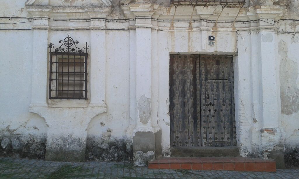 Pordo de blazona hejmo